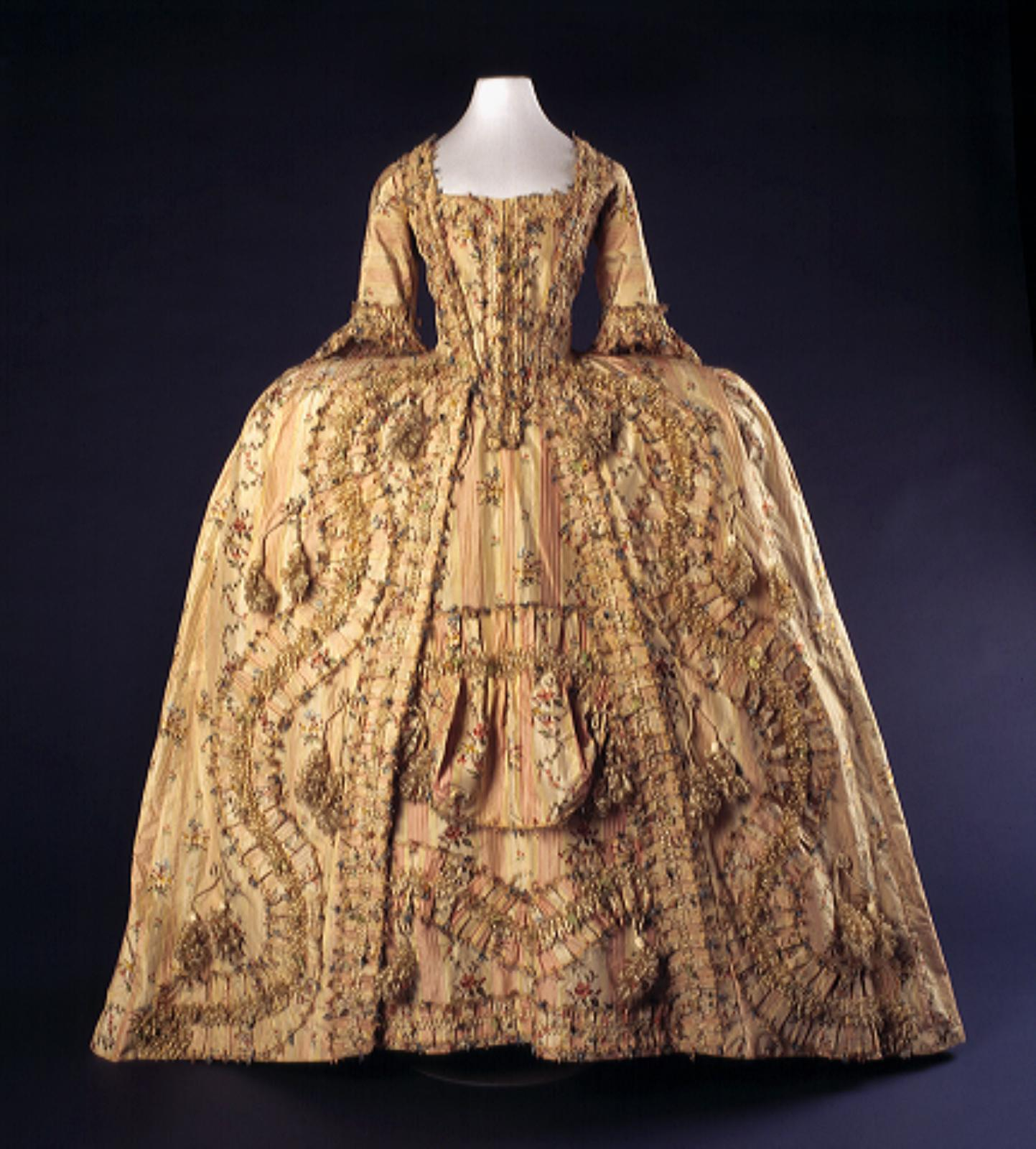 In de tweede helft van de achttiende eeuw dicteerden het Franse en Engelse hof de mode. Andere Europese hoven en de adel volgden. Kostbare beschilderde zijden stoffen waren populair, zowel de uit China geïmporteerde als de in West-Europa gefabriceerde. Deze japon, ´robe à la française´ genoemd, heeft de kenmerkende rug die in platte plooien is gelegd en die vanaf de schouders uitwaaieren tot op de grond. Het is de vroegste japon uit de collectie van het Amsterdam Museum. De zijden overjapon en rok zijn met de hand beschilderd. Meer dan tachtig bloemensoorten, elf vlindersoorten, verschillende insecten en een vogel zijn afgebeeld.